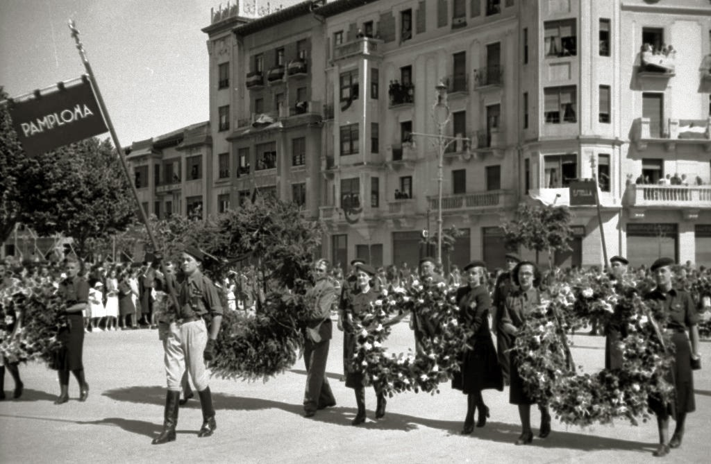 Título original: Llegada de los restos mortales del comandante aviador Julio Ruiz de Alda (18/18) Localización: Pamplona (Navarra)